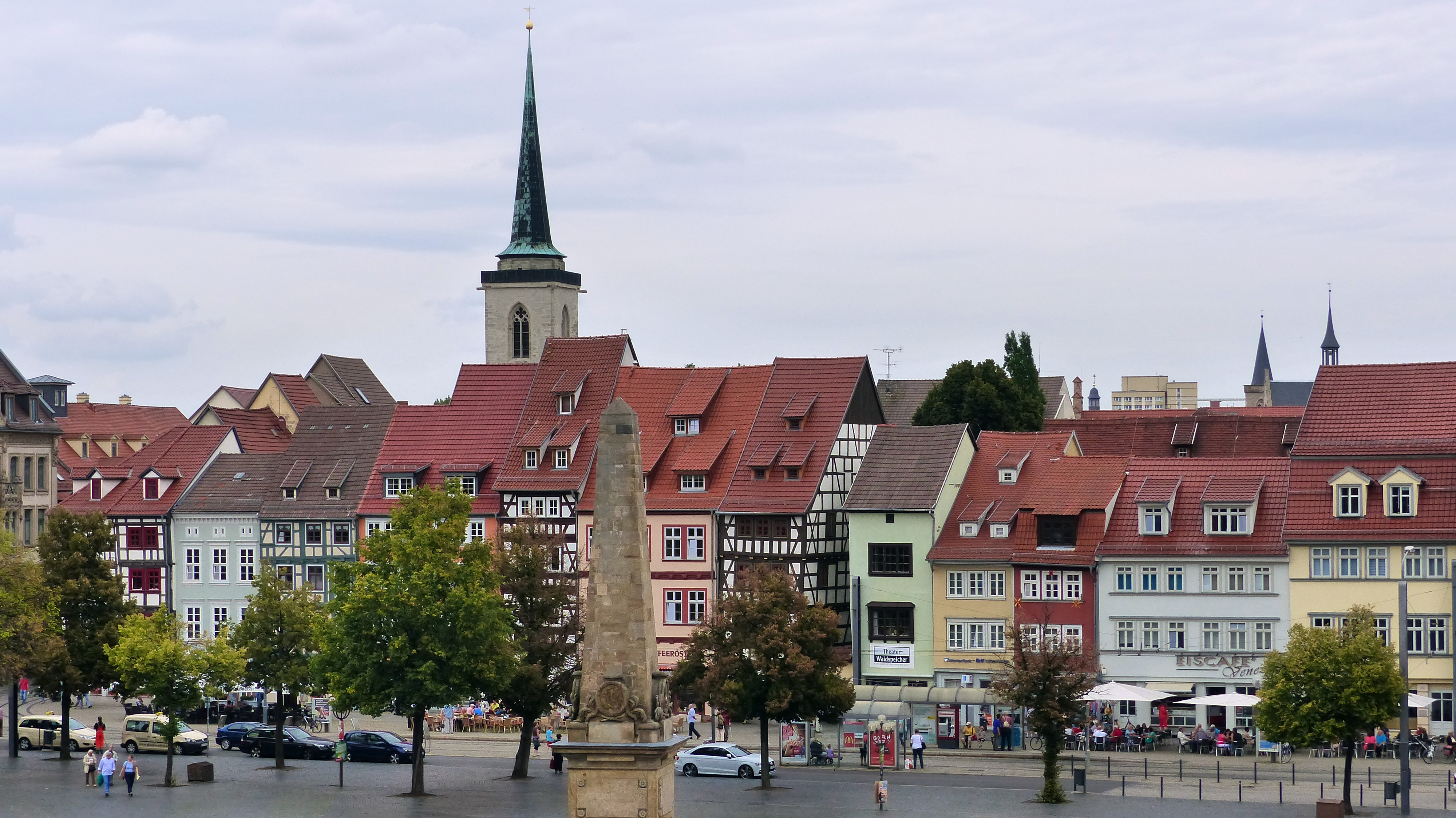 Domplatz (Erfurt)